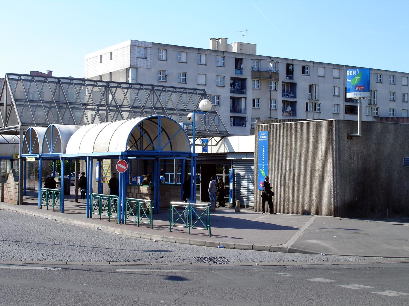 Gare de Sevran - Beaudottes à Sevran (Seine-Saint-Denis), France